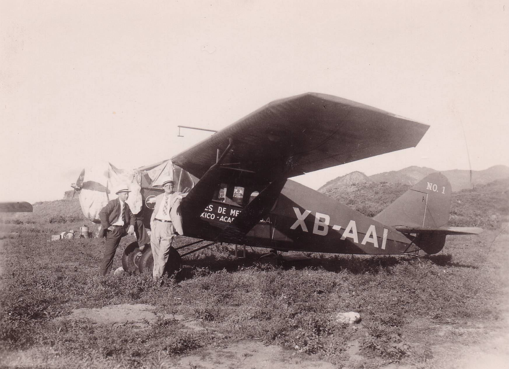 Aeronaves de México plane #1 Mexico City Acapulco Walter Luyken + Mr. Haberbier